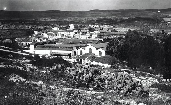 זכרון יעקב - היקב